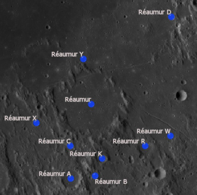 Cráter lunar Réaumur. Cráteres satélite. (Imagen LRO)